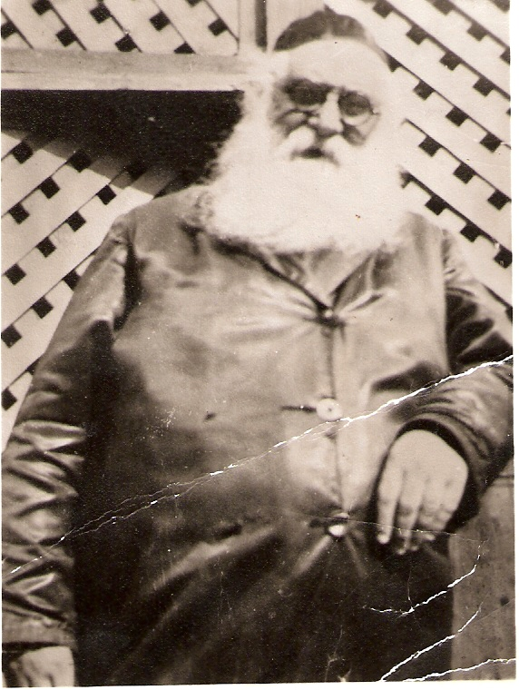 יצחק אייזיק לנגנר